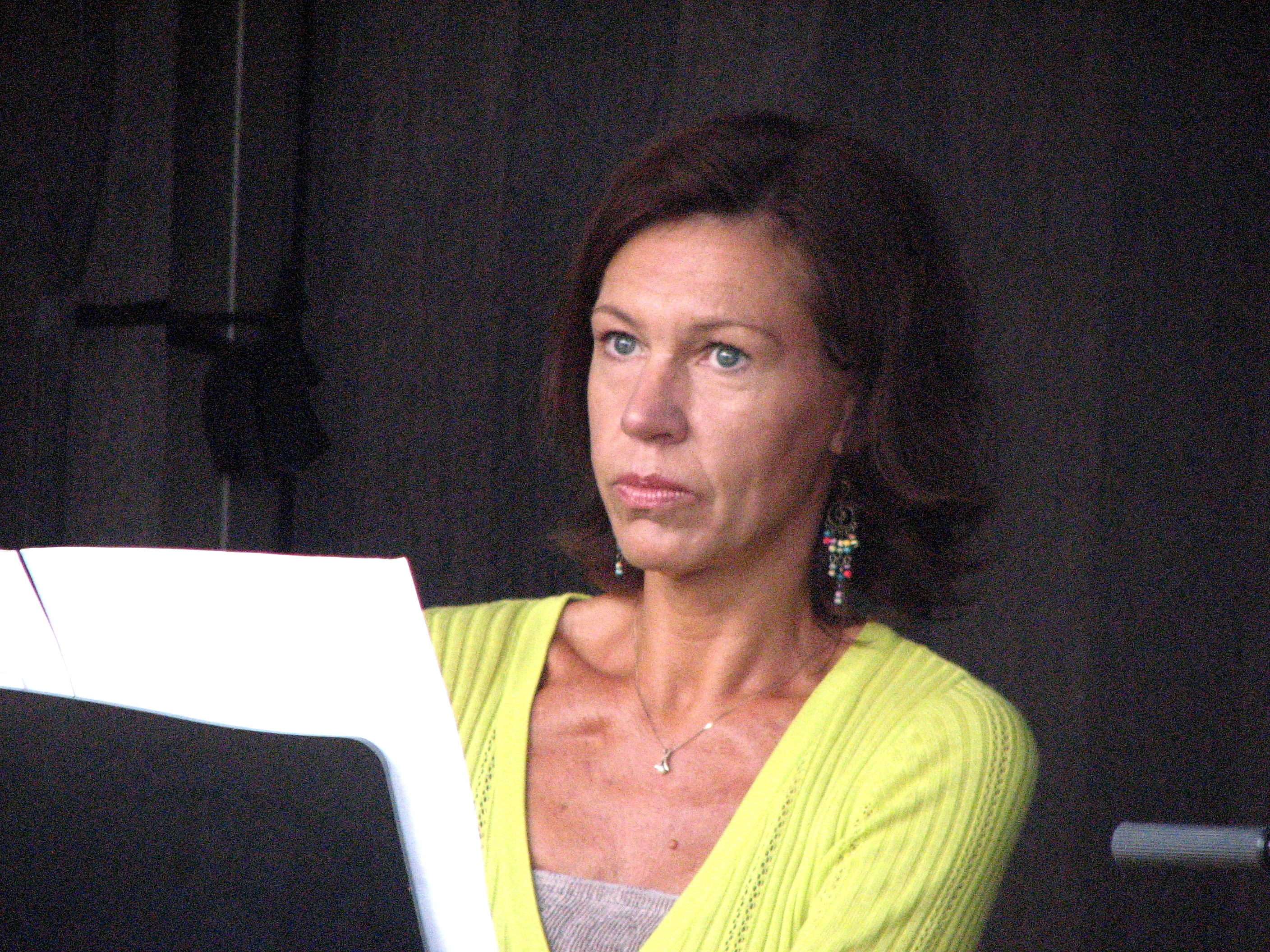 Lea Leiten esinemas Kuressaare Arensburgi ooperikohvikus